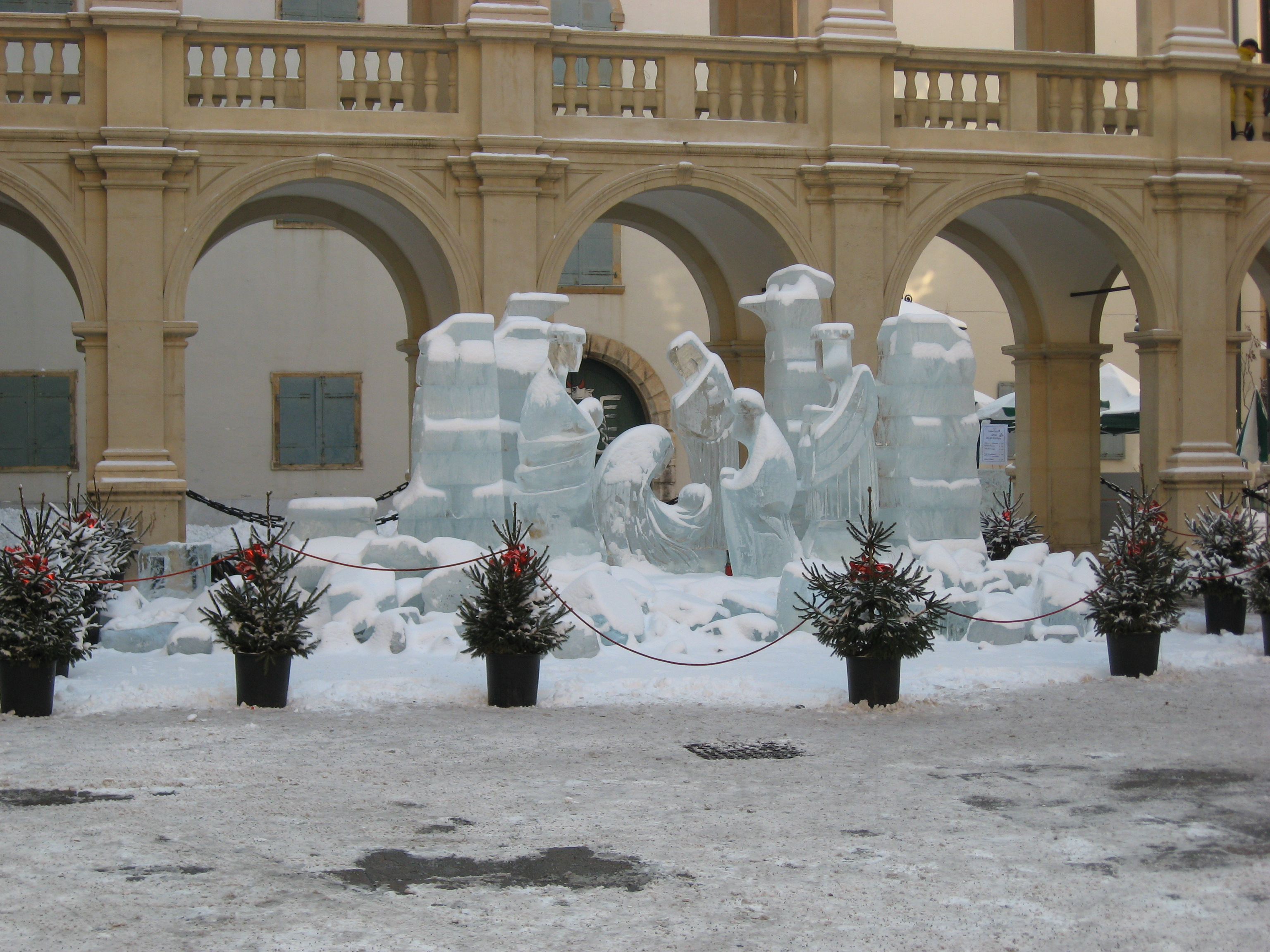 Eiskrippe im Grazer Landhaushof 2009